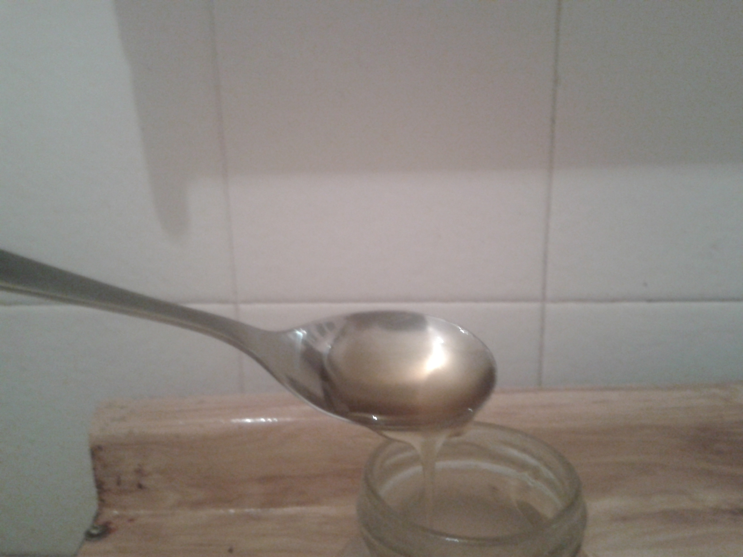 Cuchara con miel